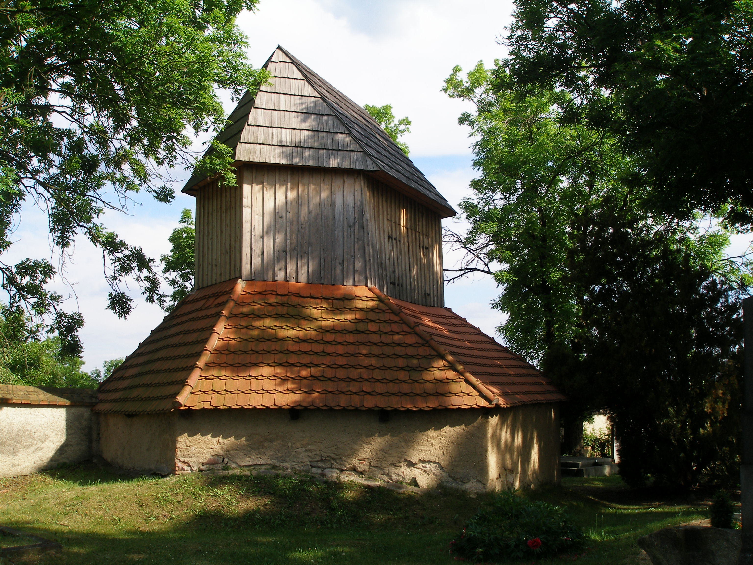 Zvonička na hřbitově v Nabdíně.